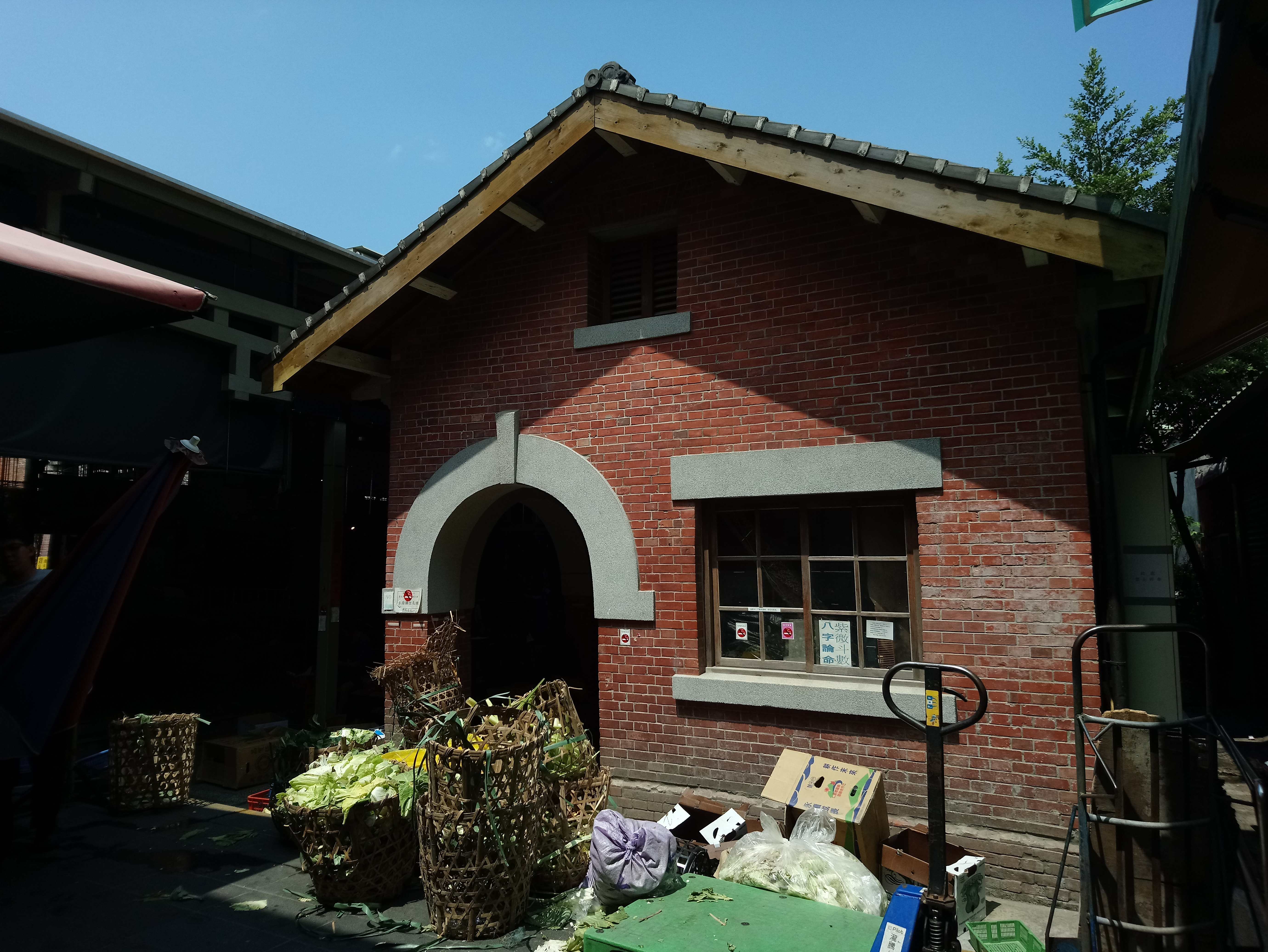 士林公有市場拱廊店鋪,台北市士林區街上次分區義信里